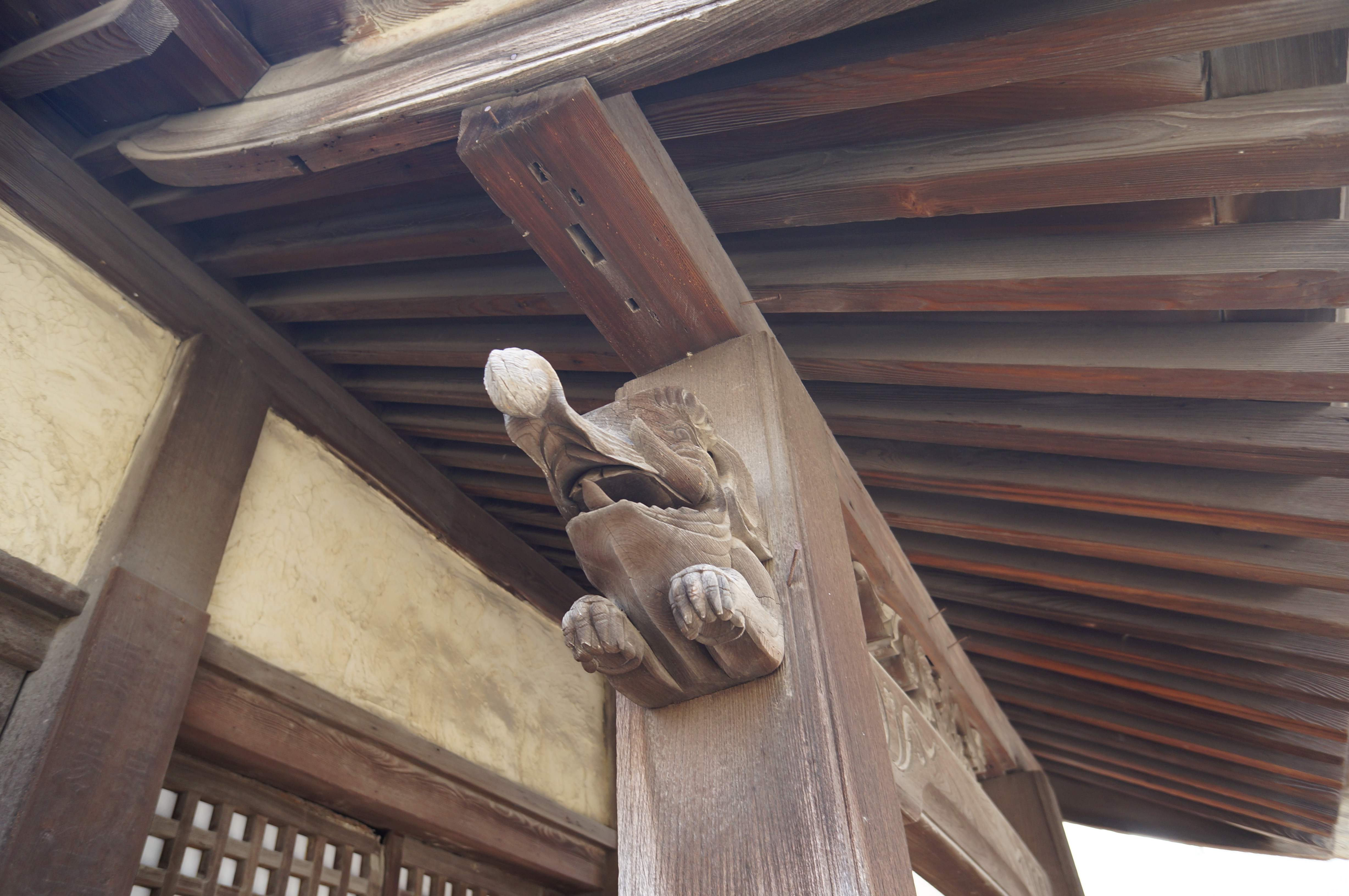 堺市北区円通寺 象鼻